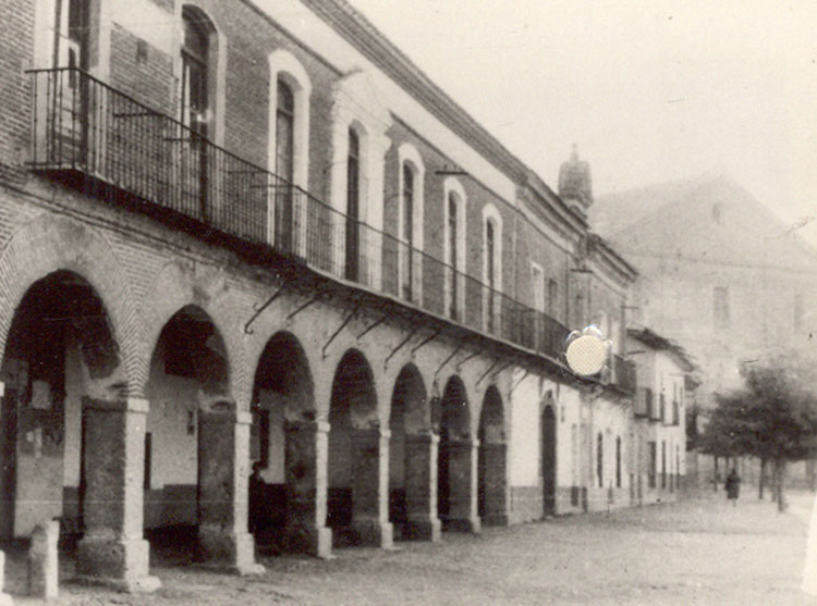 Plaza - La Seca (Valladolid) - Colección de cromos álbum de Valladolid editado por la Caja de Ahorros Provincial en 1962. A pesar de su paradójico nombre, La Seca se encuentra en un valle regado por varios afluentes del Duero. - Fotografía 60 x 42 B/N